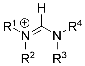 Formamidinium cation